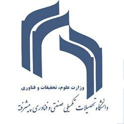 arm kgut